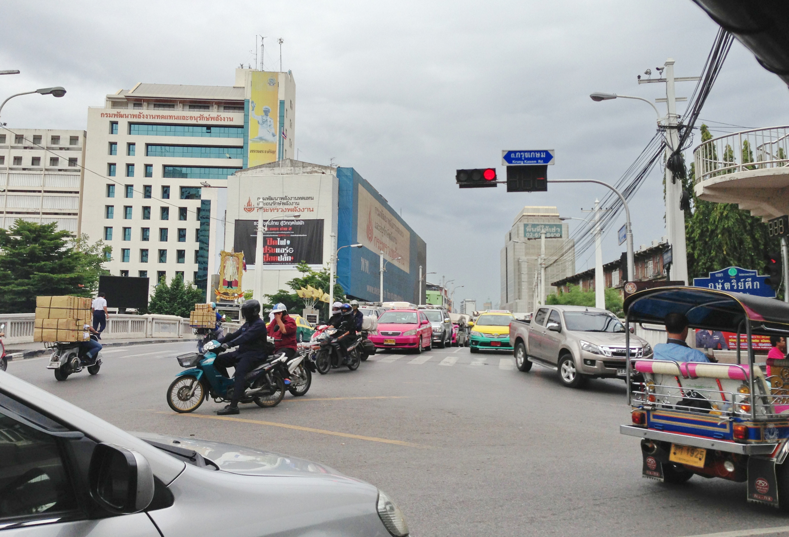 Krung Kasem- Thanon bamrang Muang rd, Khlong maha nak, Pom prap Sattru Phai, Bangkok